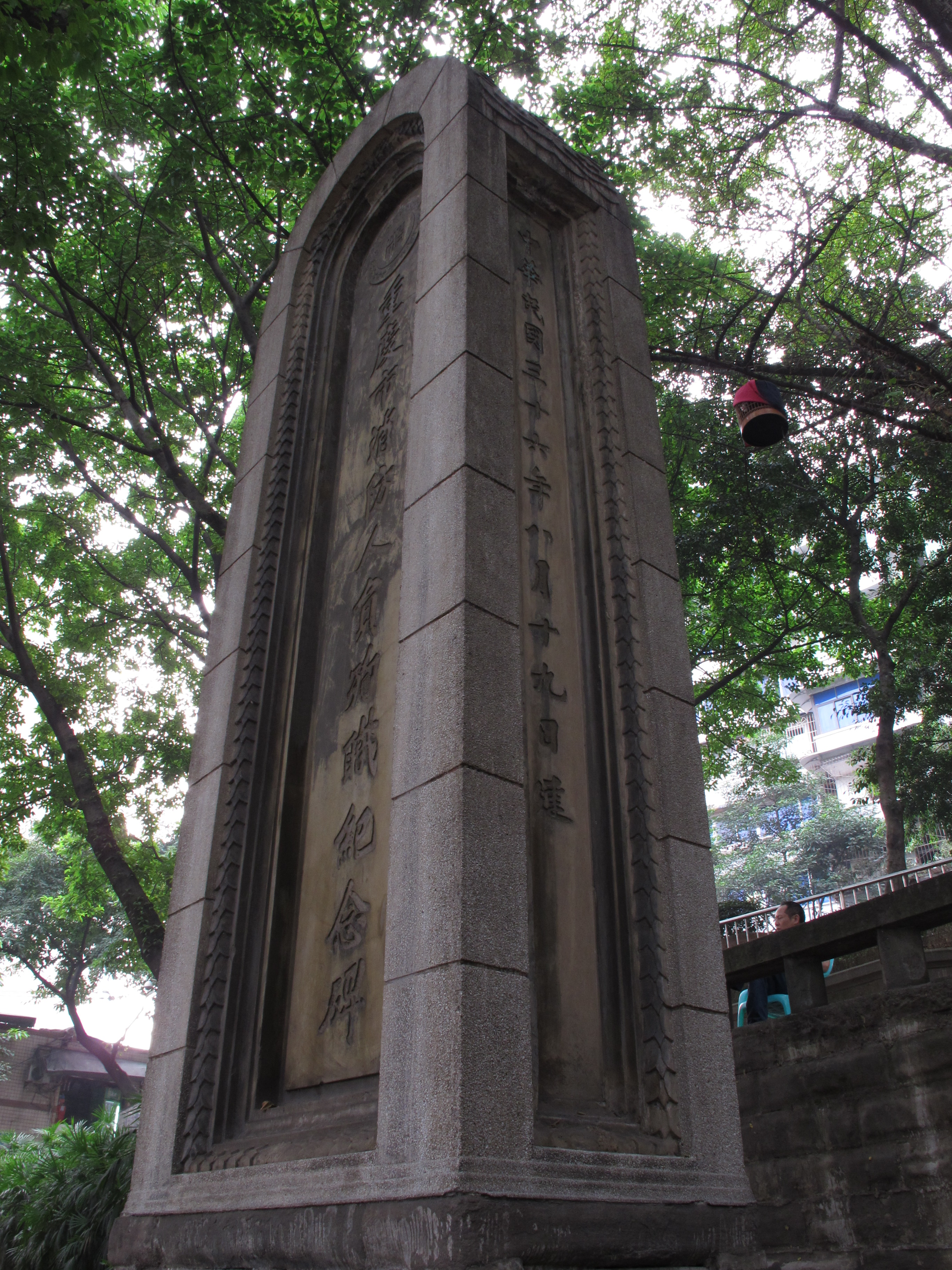 位于重庆市人民公园内